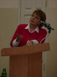 Морзе Наталія Вікторівна — академік АН вищої школи України